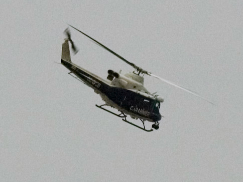 Cesena: Agusta-Bell AB-412 dei Carabinieri